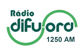 "A Rádio das Comunidades, Sempre Pertinho de Você"